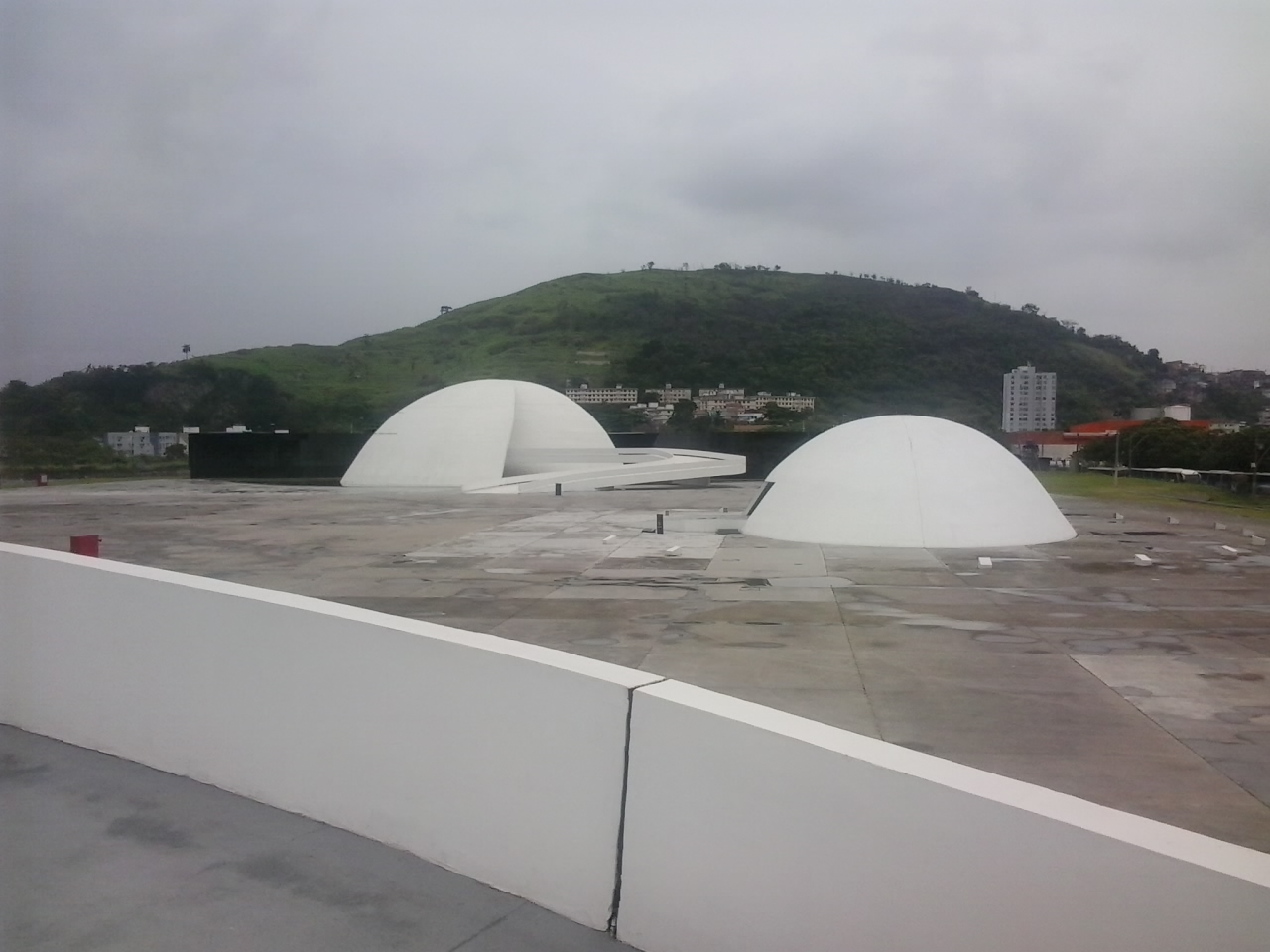 Praça Popular Caminho Niemeyer